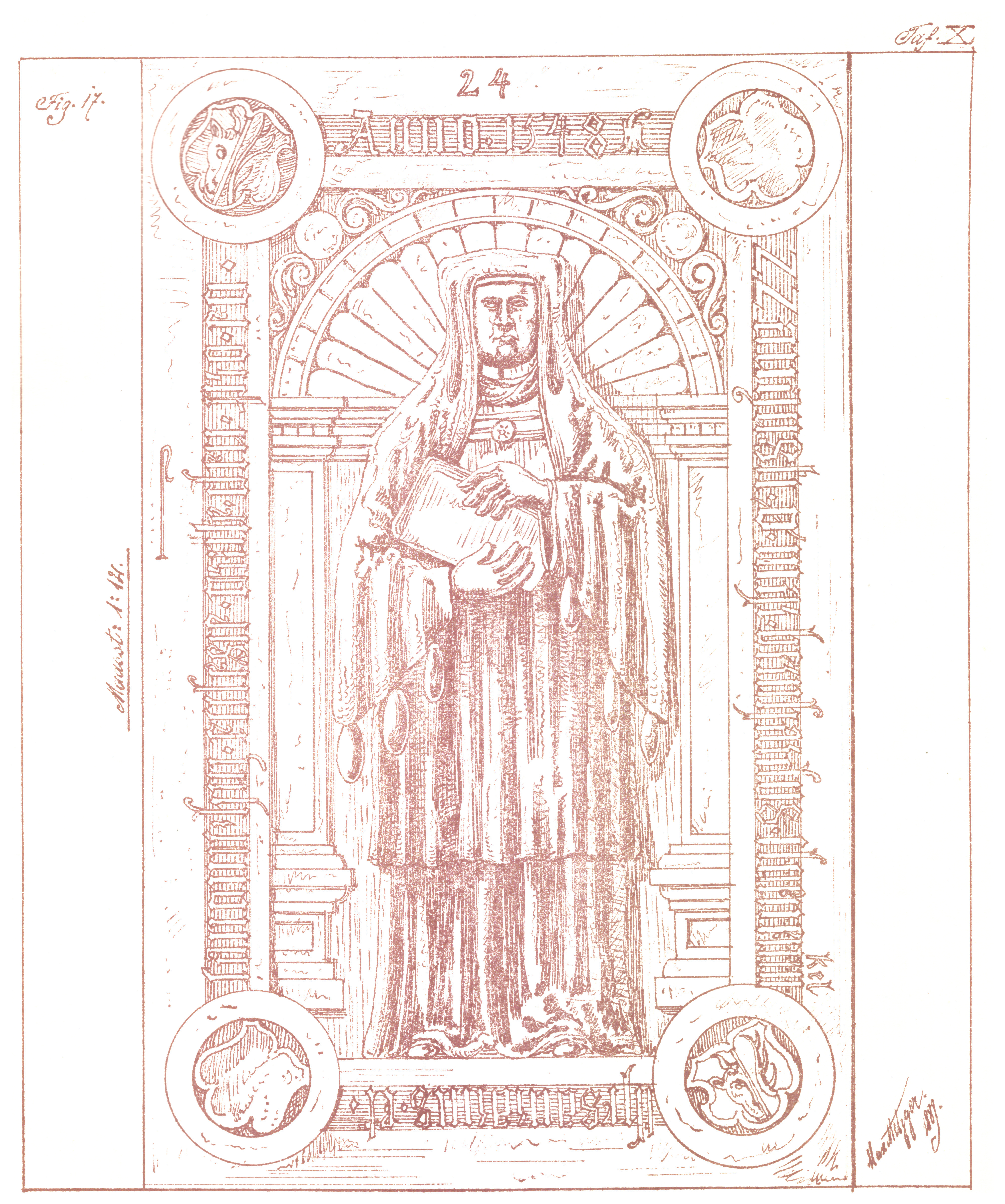 Grabplatte des Lübecker Domherrn Bernhard Cloenewinkel (gest. 1548) im Lübecker Dom (LÜDO299). Zeichnung von Max Metzger (Lehrer) (gest. 1941) als Tafel X in Theodor Hach: "Die Anfänge der Renaissance in Lübeck"